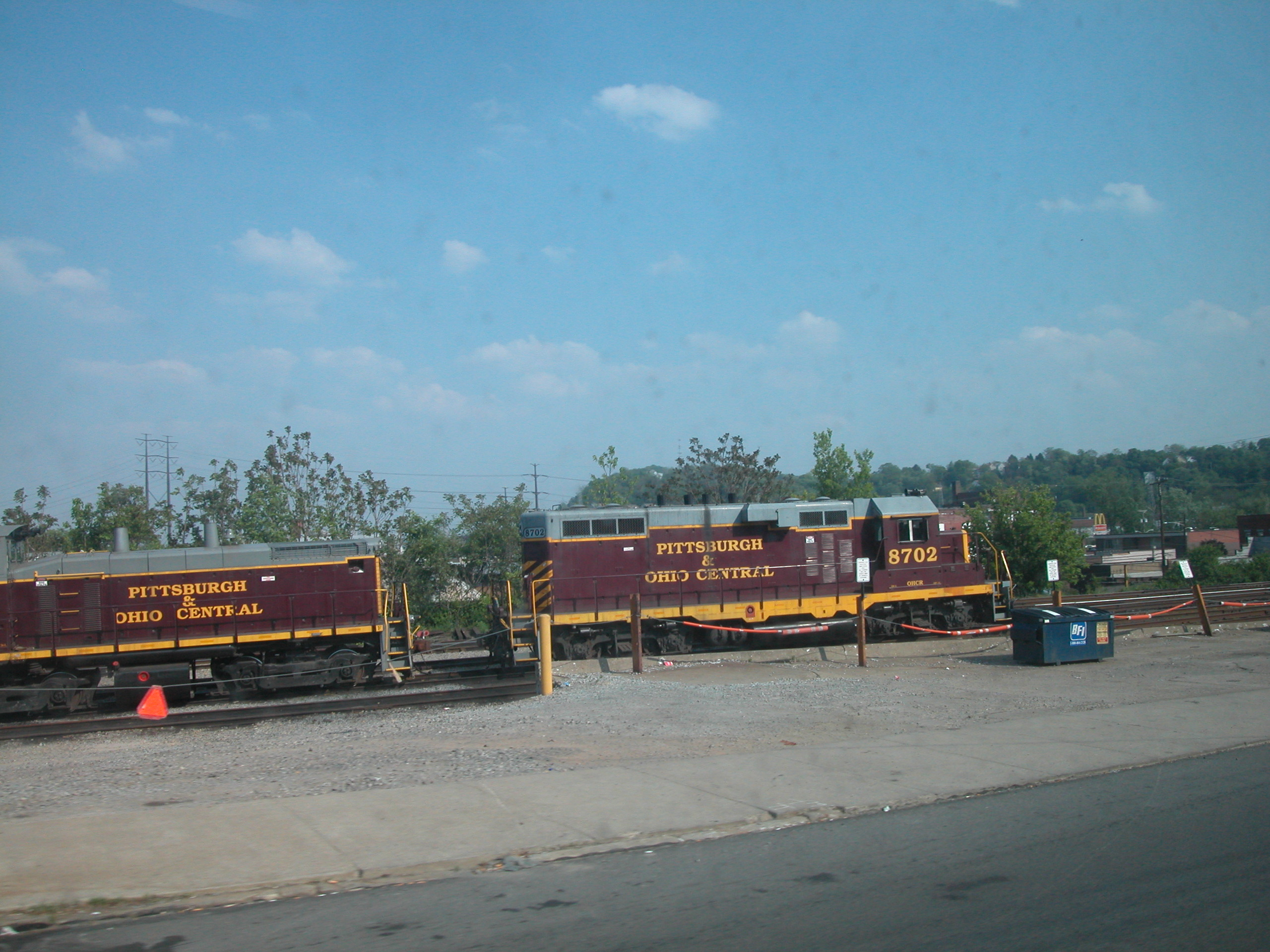 20070515 13 POC Pittsburgh, PA